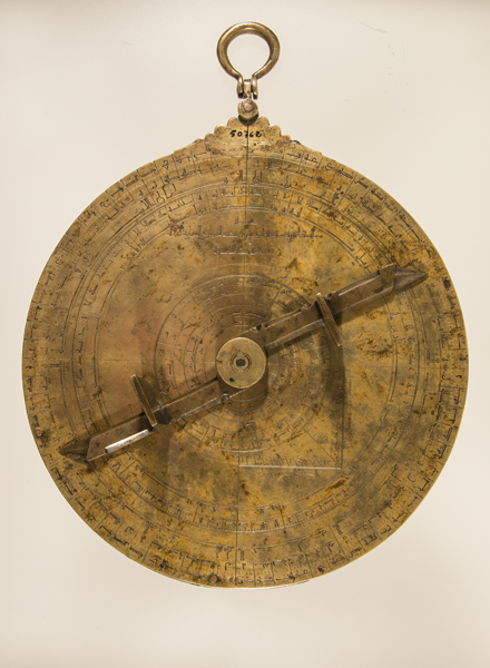 Astrolabio de Ibrahim ibn Said al-Sahli (reverso) (Periodo de los Reinos Taifas). Número de inventario: 50762.